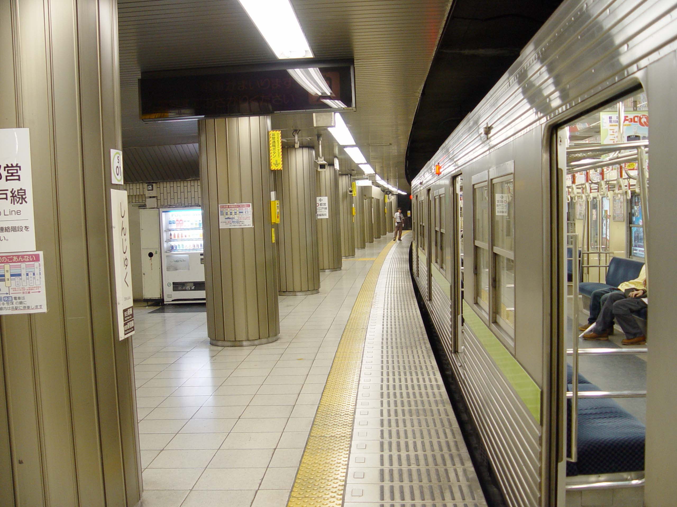 Shinsen-Shinjuku Station